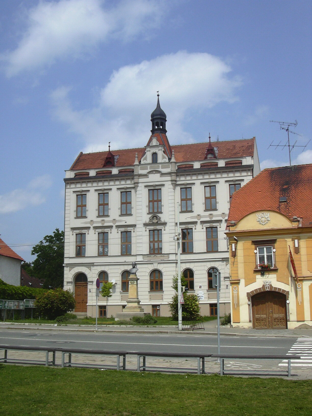 Základní umělecká škola Františka Sušila (Rousínov- Czech republic)